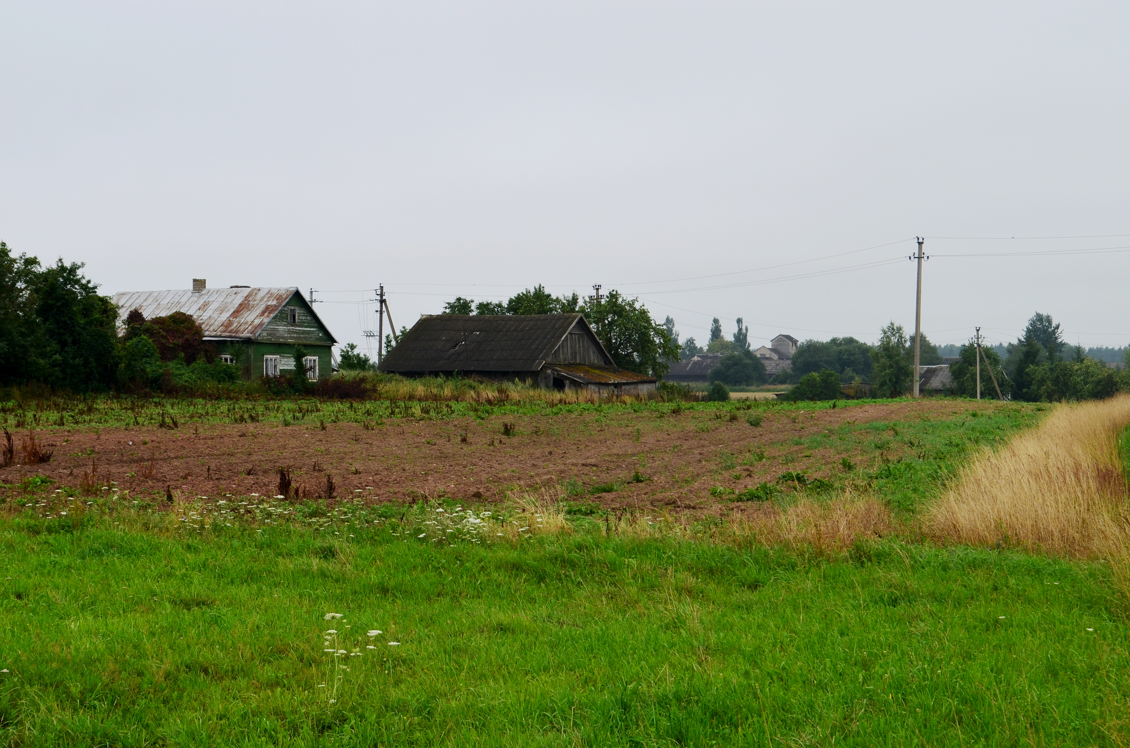 Milašiūnai, Ukmergės raj.